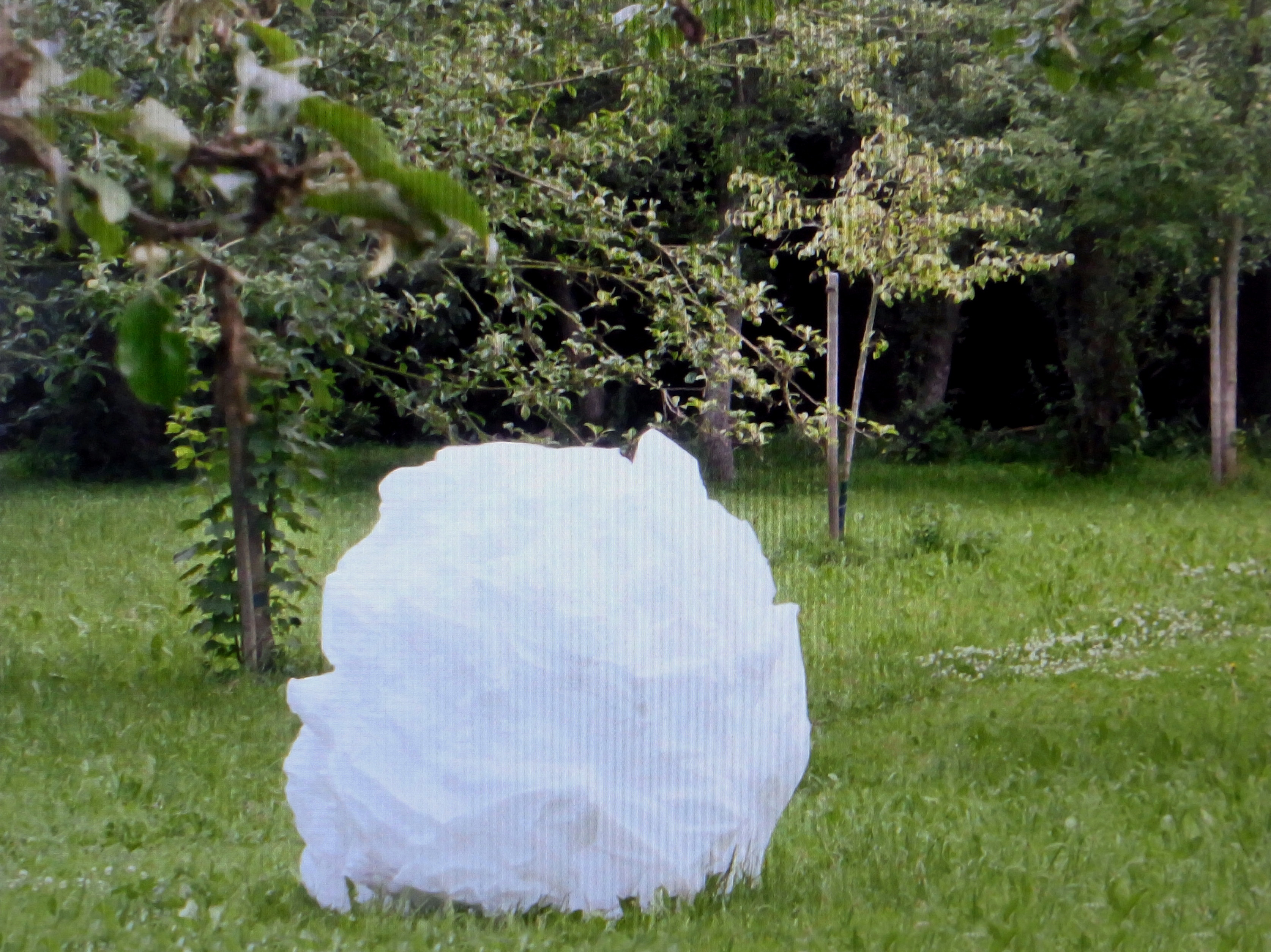 In der Freiluft-Kunstausstellung Verformungen vom 13. Juli bis 15. August 2017 in der historischen Gartenanlage des Edelhofs Ricklingen (Am Edelhofe) in Hannover ist die von einer Jury um die hannoversche Kuratorin Dagmar Brand ausgewählte Arbeit der Künstlerin Dagmar Schmidt unter dem Titel „Brain II“ zu sehen ...